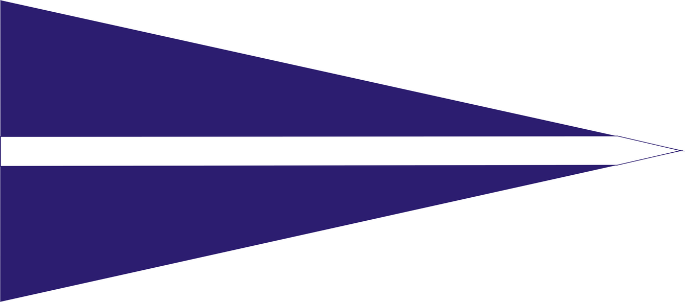 LWP - barwy broni na kołnierze kurtek obowiązujące od 1943 - wojska samochodowe